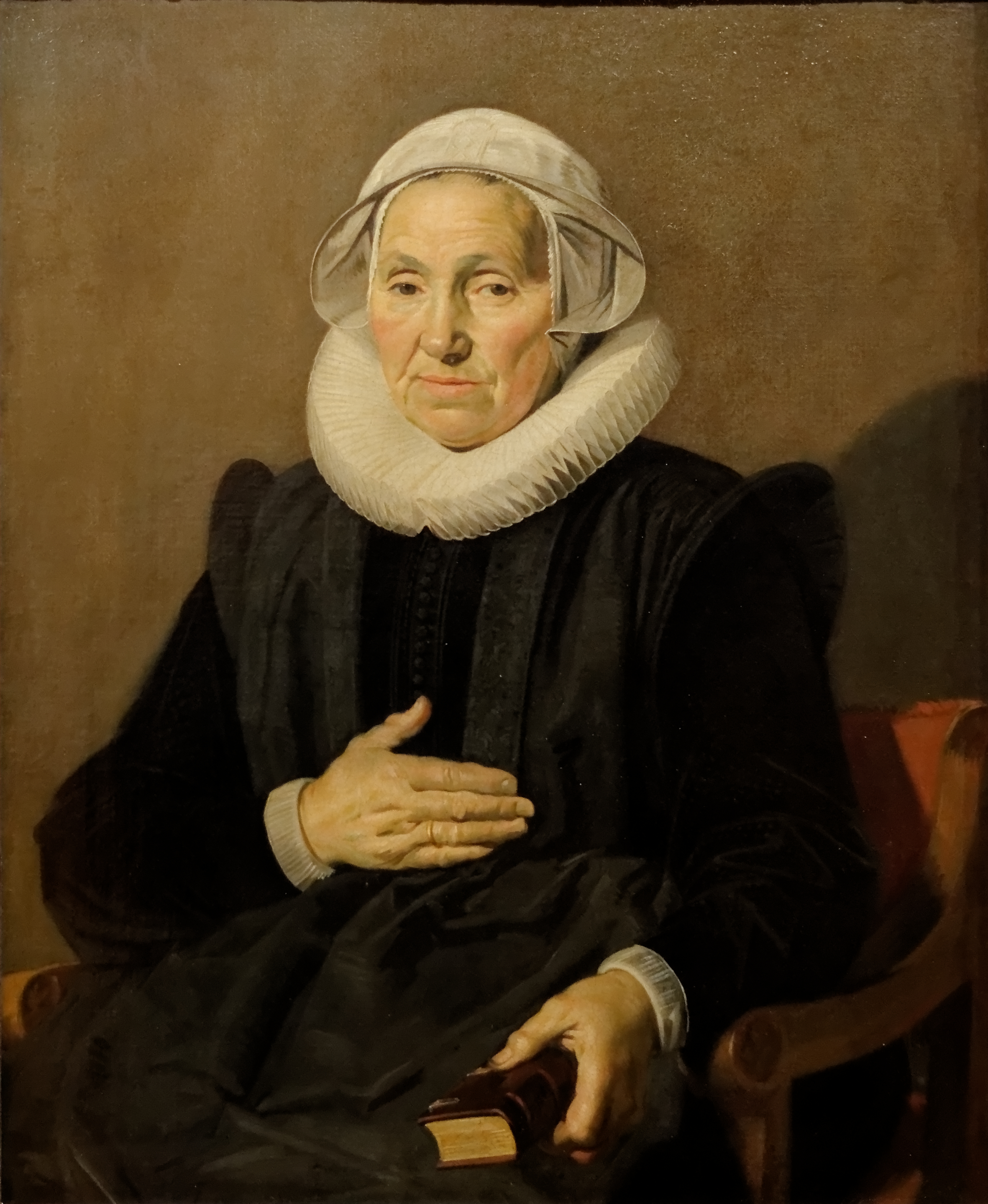 Portrait de Sara Andriesdr Hessix par Frans Hals (ca 1626). Huile sur toile exposée au musée Calouste Gulbenkian. Inv 214